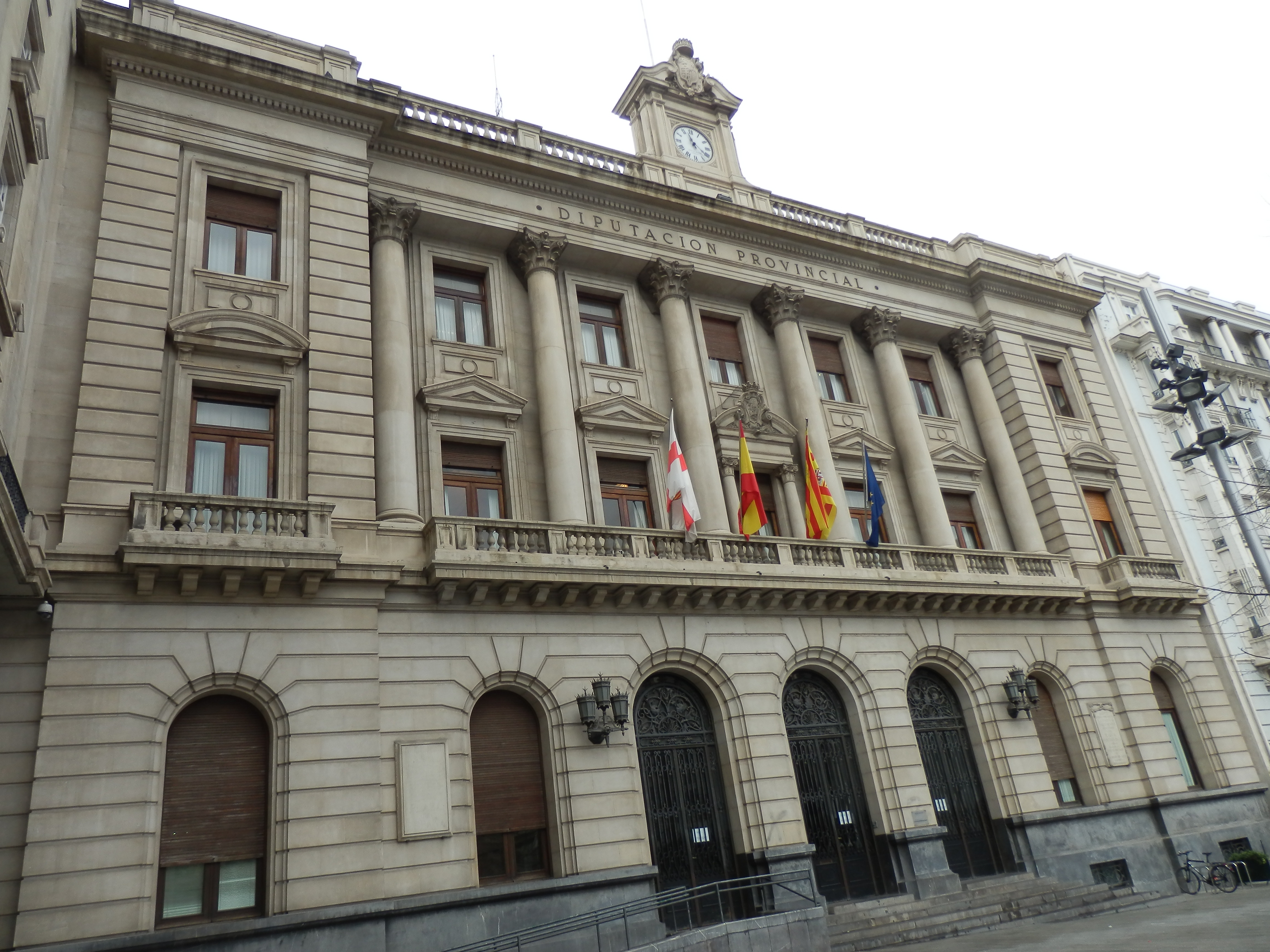 Edificio de la Diputación Provincial de Zaragoza situado en la Plaza de España.